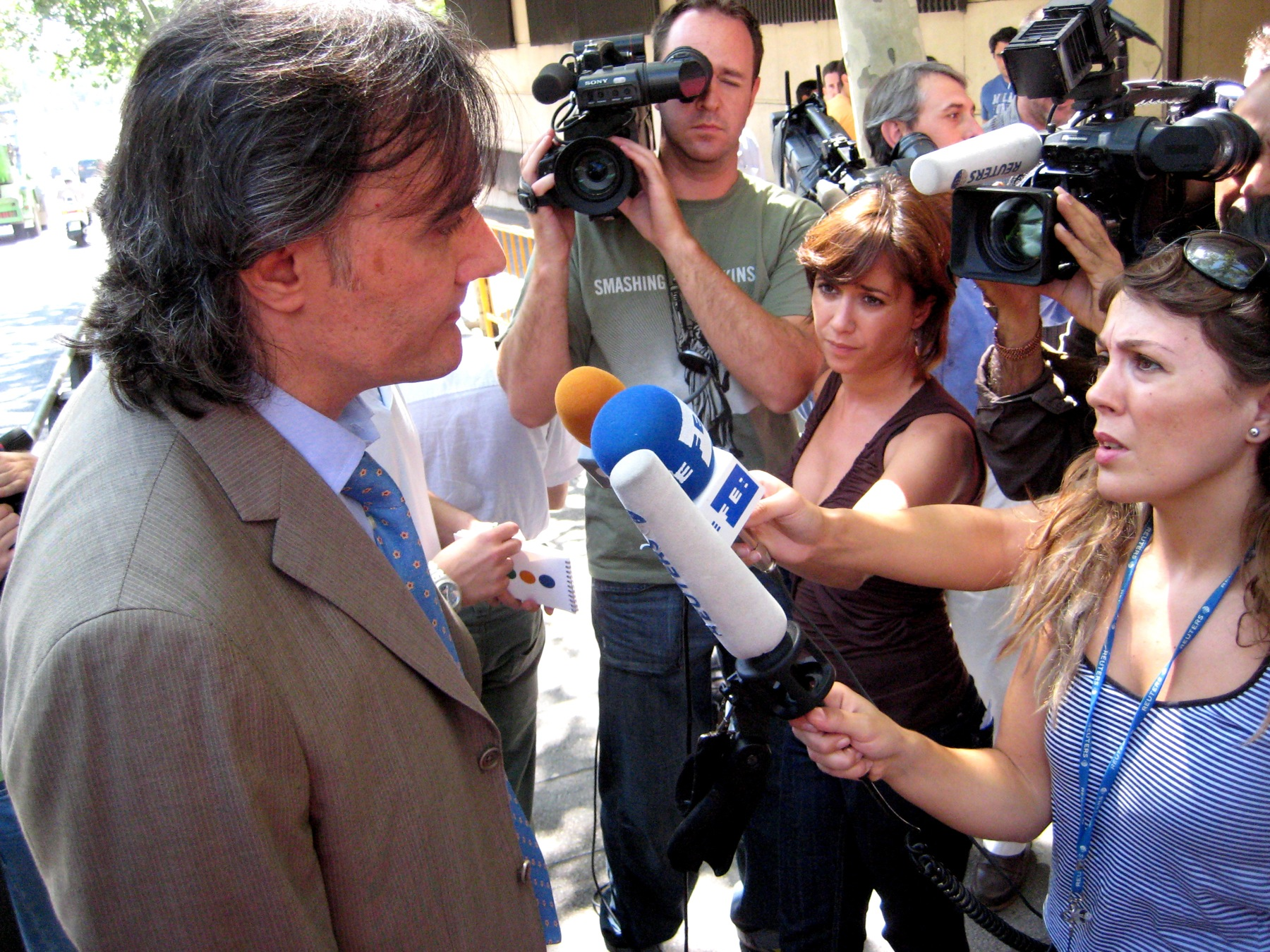 Salida de la Audiencia Nacional del dibujante Guillermo tras prestar declaración con motivo del presunto delito de injurias a la Corona tras la publicación de un chiste en la portada del número 1.573 del semanario de humor El Jueves.